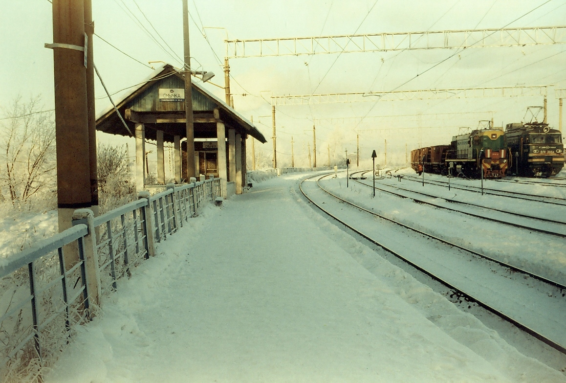 Чётная платформа на Нижний Тагил (парк "В")